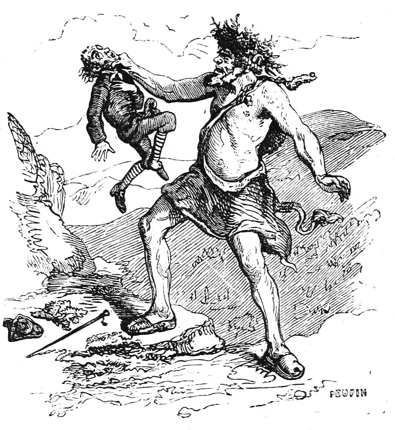 Illustration du Dictionnaire infernal par Louis Le Breton.